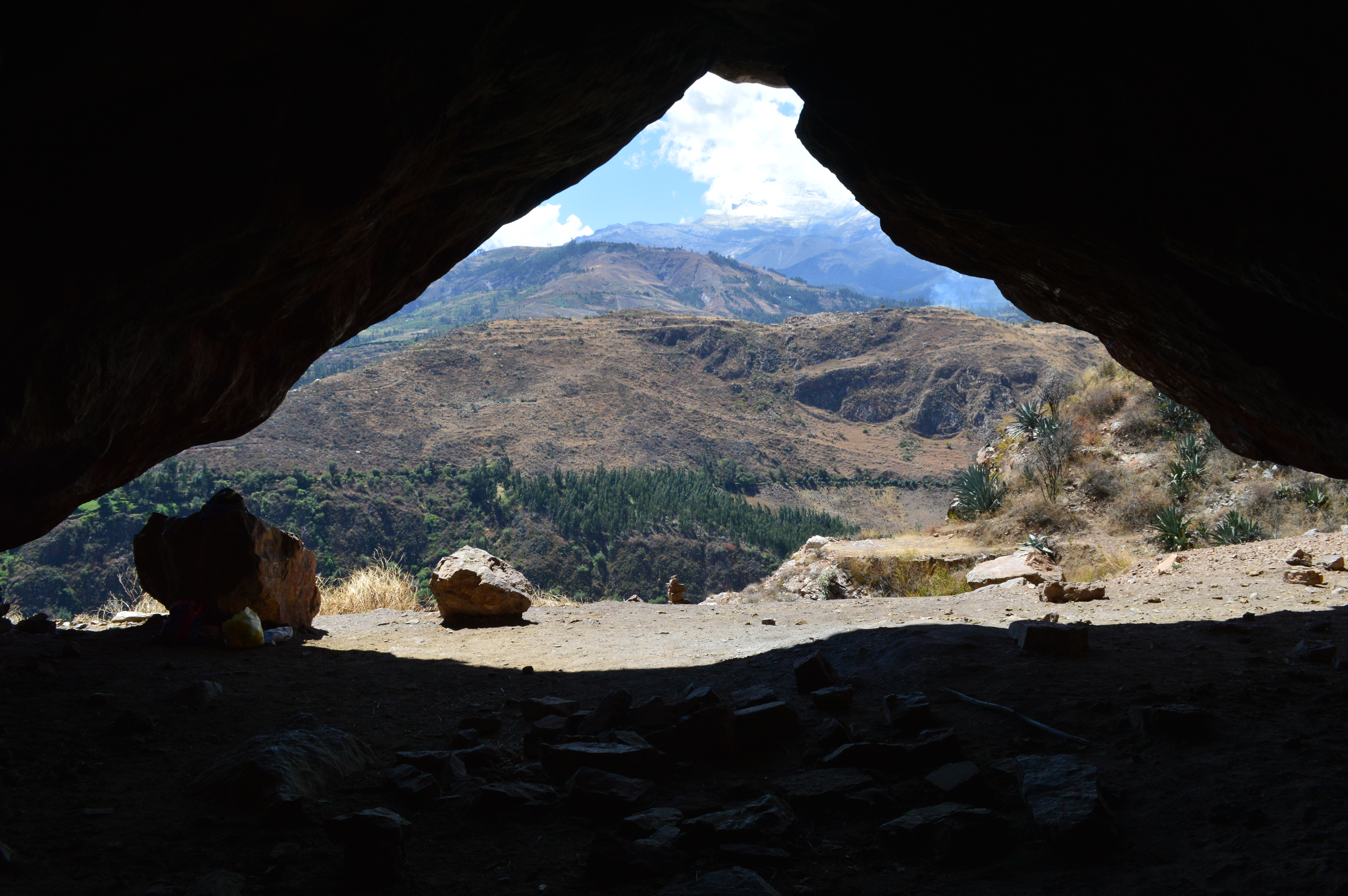 Vista desde el interior en la Cueva de Guitarrero hacia el este, Callejón de Huaylas, Perú. Foto tomada en julio de 2019.